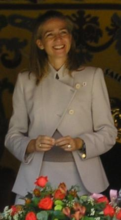 Cristina de Borbón y Grecia (27-10-2006)